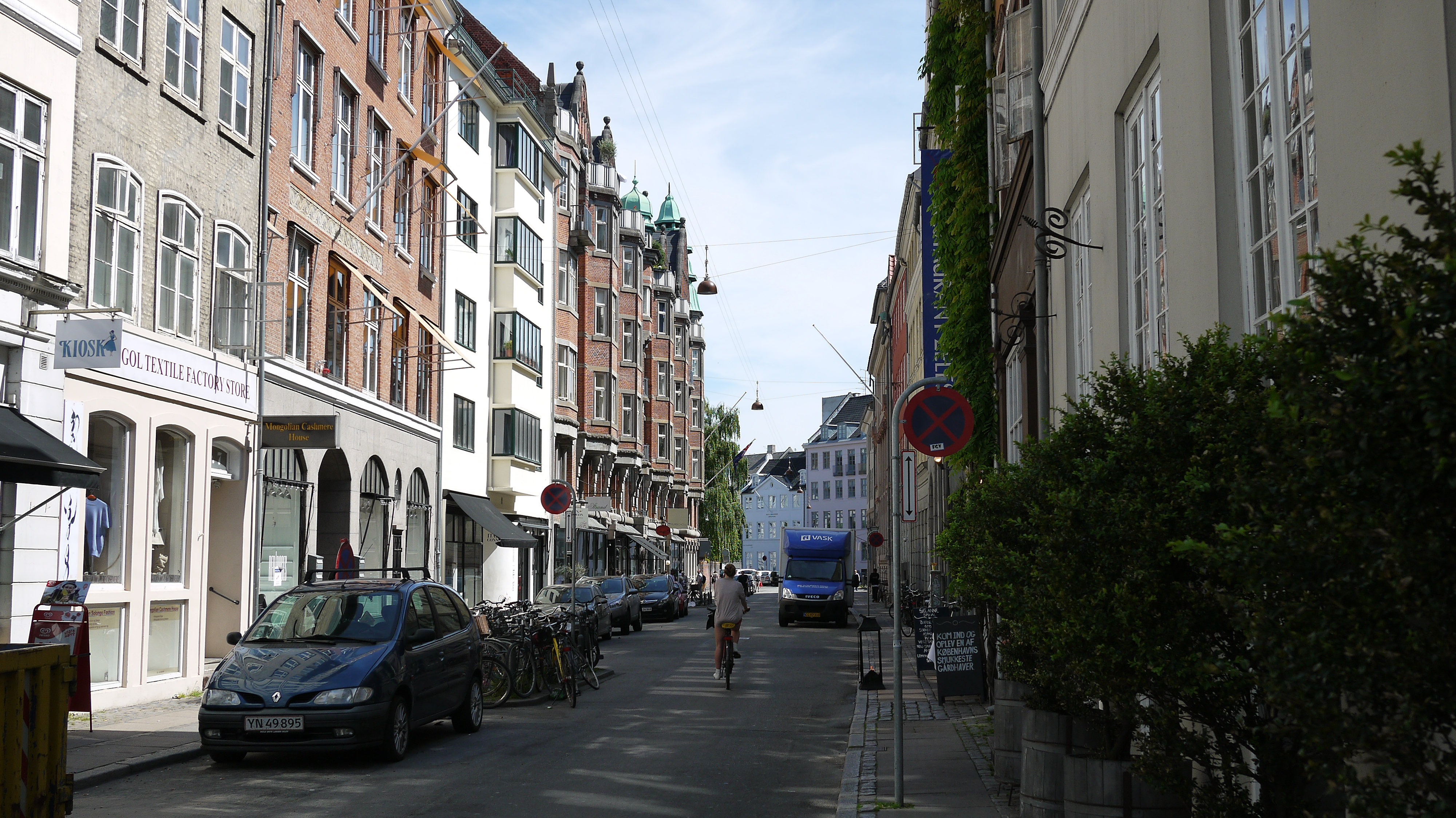 Store Strandstræde in Copenhagen, Denmark